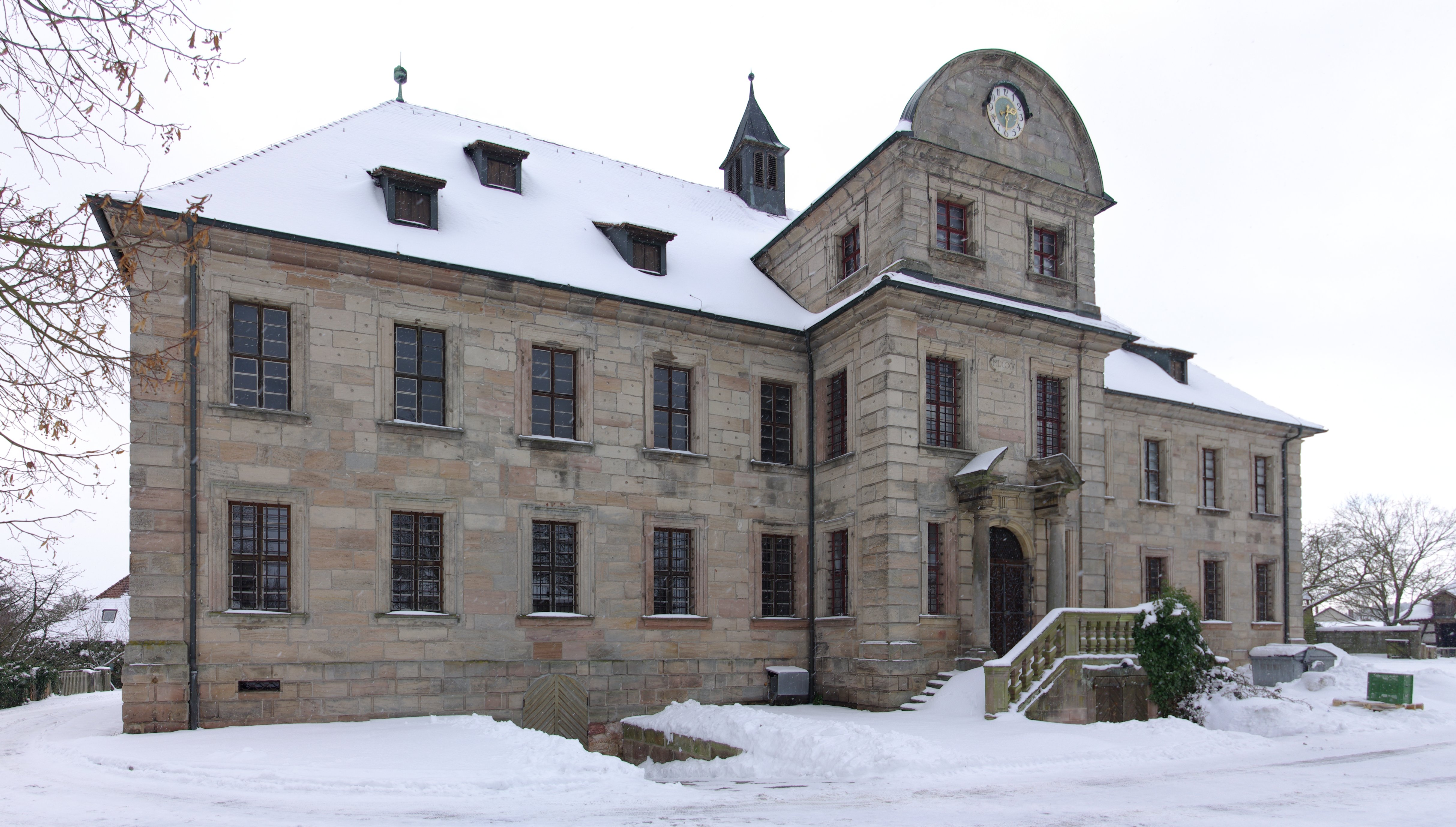 Schloss Hemhofen